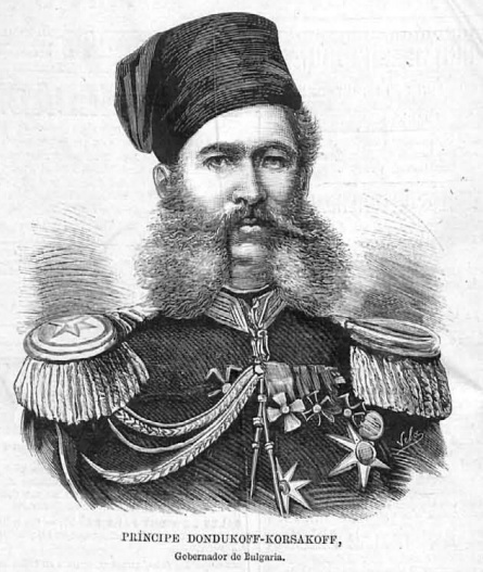 Imagen del kniaz Dondukov-Korsákov en un grabado español de la revista "La Ilustración Española y Americana". 1878